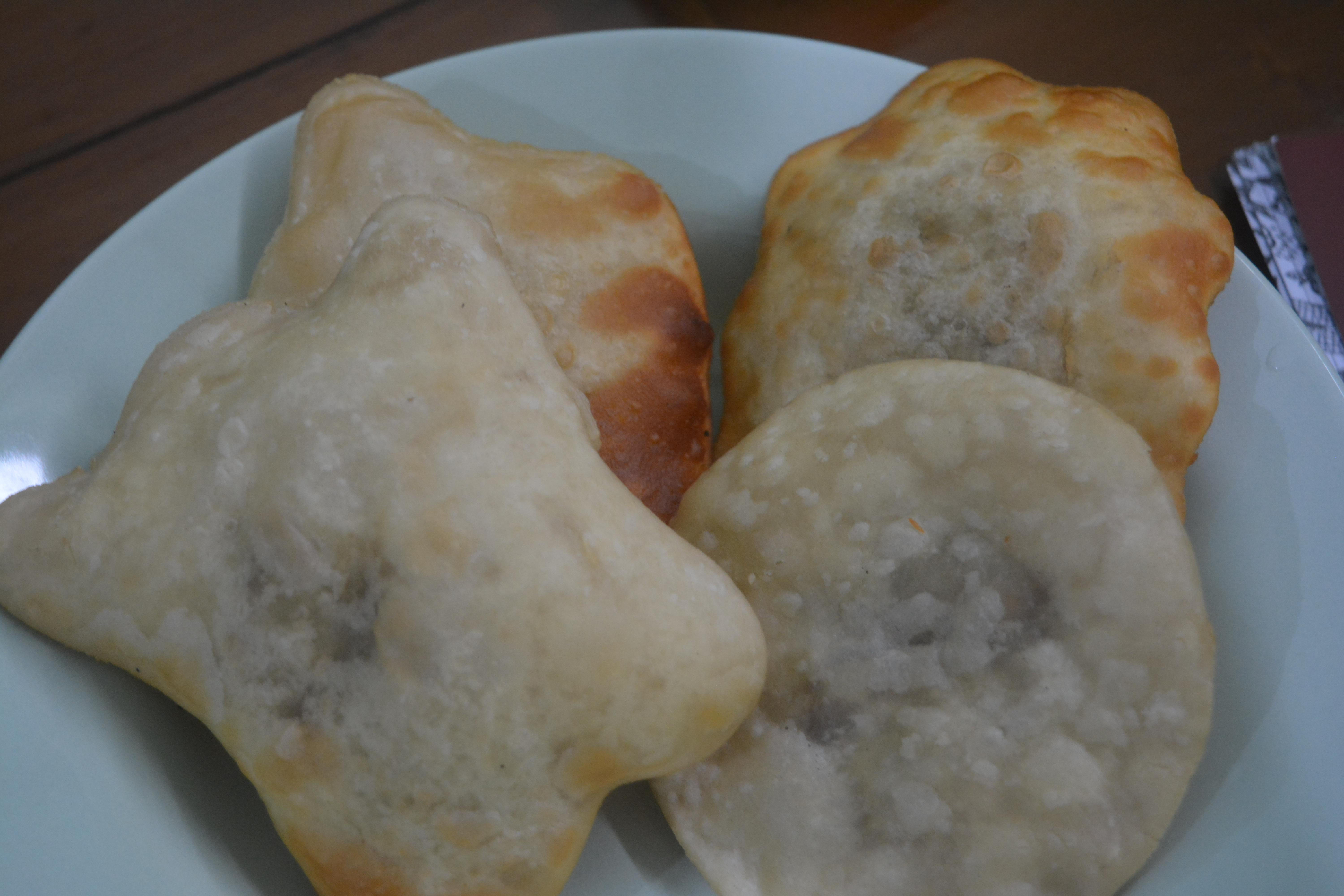 Cireng Isi merupakan jajanan khas Jawa Barat